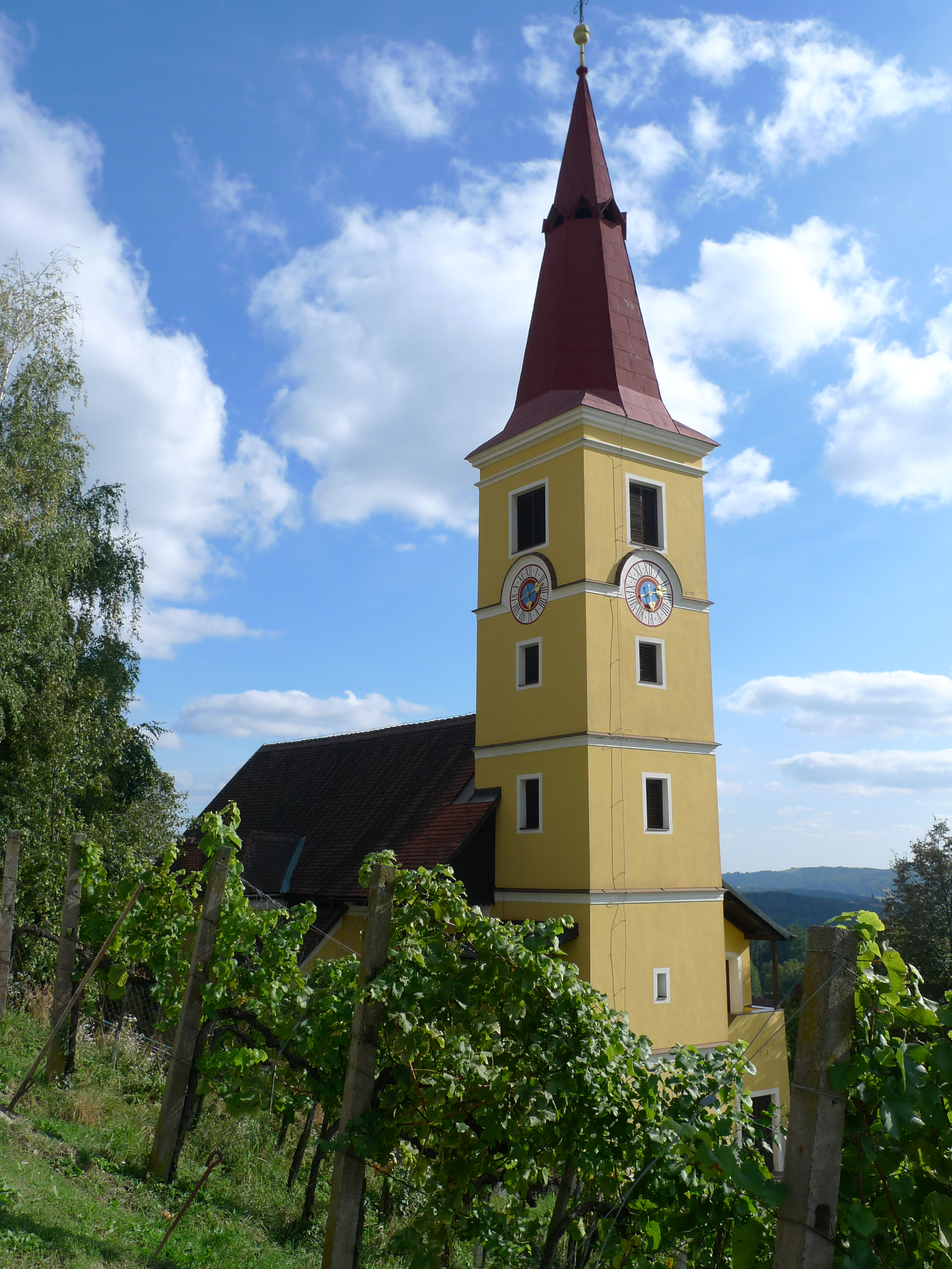 Kath. Pfarrkirche hl. Nikolaus